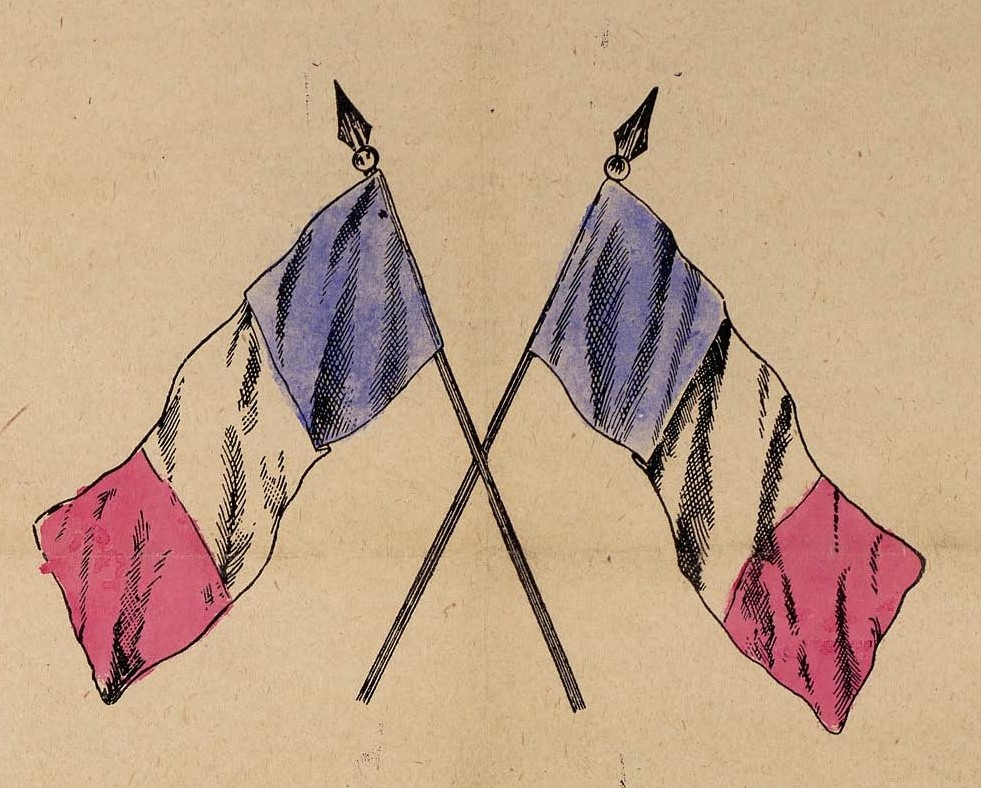 Affiche « ordre de mobilisation générale » datée du 2 août 1914